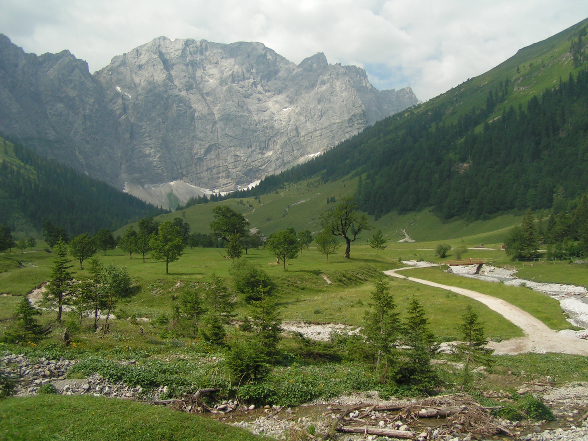 Die Grubenkarspitze vom Engtal